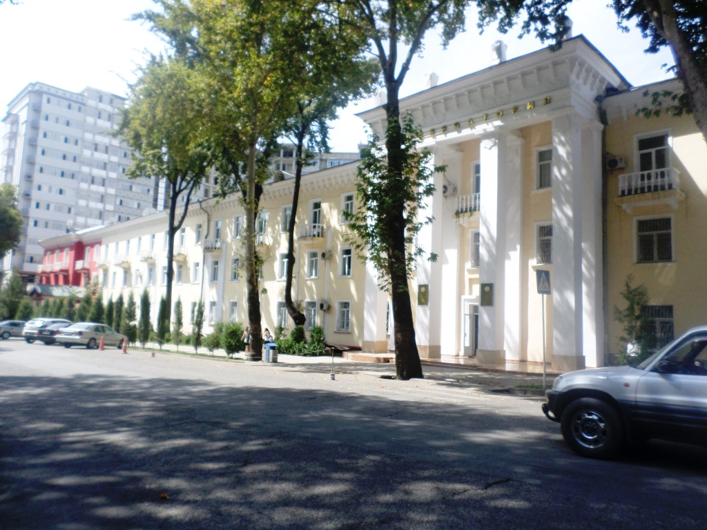 Национальная консерватория Таджикистана им. Т. Сатторова в г. Душанбе